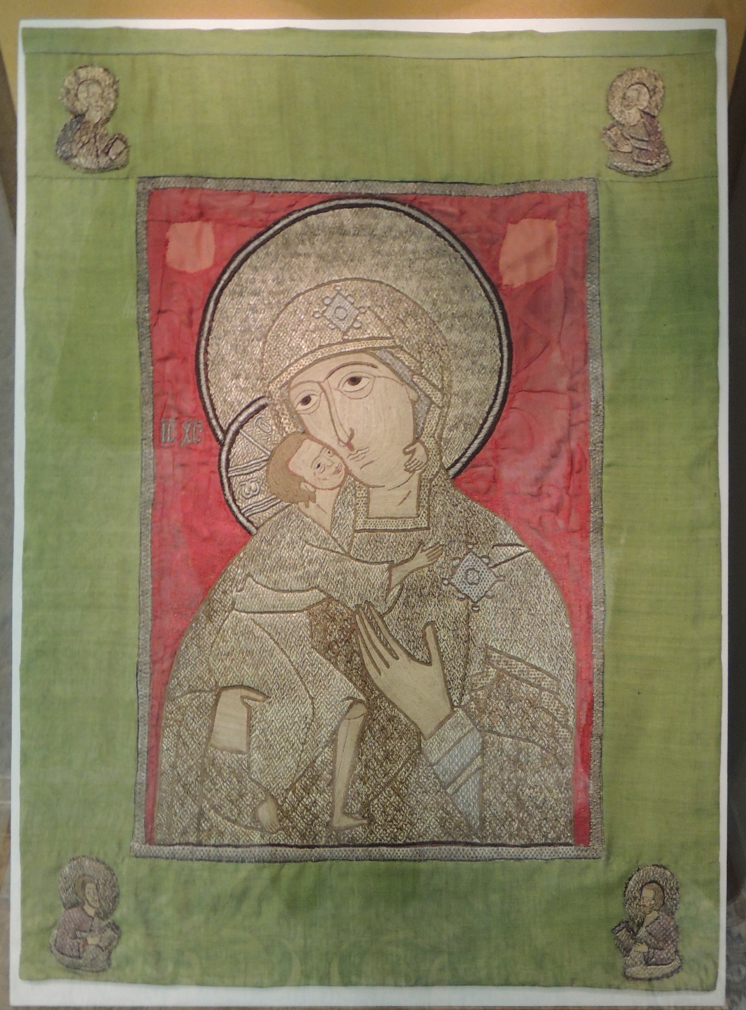 Пелена «Богоматерь Феодоровская», которая считается вкладом старицы Марфы, матери царя Михаила Федоровича, в Ипатьевский монастырь. Выставка "Романовы. Начало династии", приуроченная к 400-летию избрания на царство Михаила Федоровича Государственный Исторический музей, весна 2013 года половина XVII в. Пелена. Богоматерь Феодоровская. Холст, камка, лицевое шитье. 78,0 х 63,0 см. Церковный Историко-археологический музей. ЦИАМ БВП 209. КМЗ КОК 7579/1. Шитая икона (пелена) Феодоровской Божией Матери считается вкладом Великой старицы Марфа – матери царя Михаила Федоровича – в Ипатьевский монастырь. Шита она по венецианской камке малинового цвета серебряной и золотной прядёной нитью «в прикреп», личное – шёлковыми нитями серого цвета «в раскол».